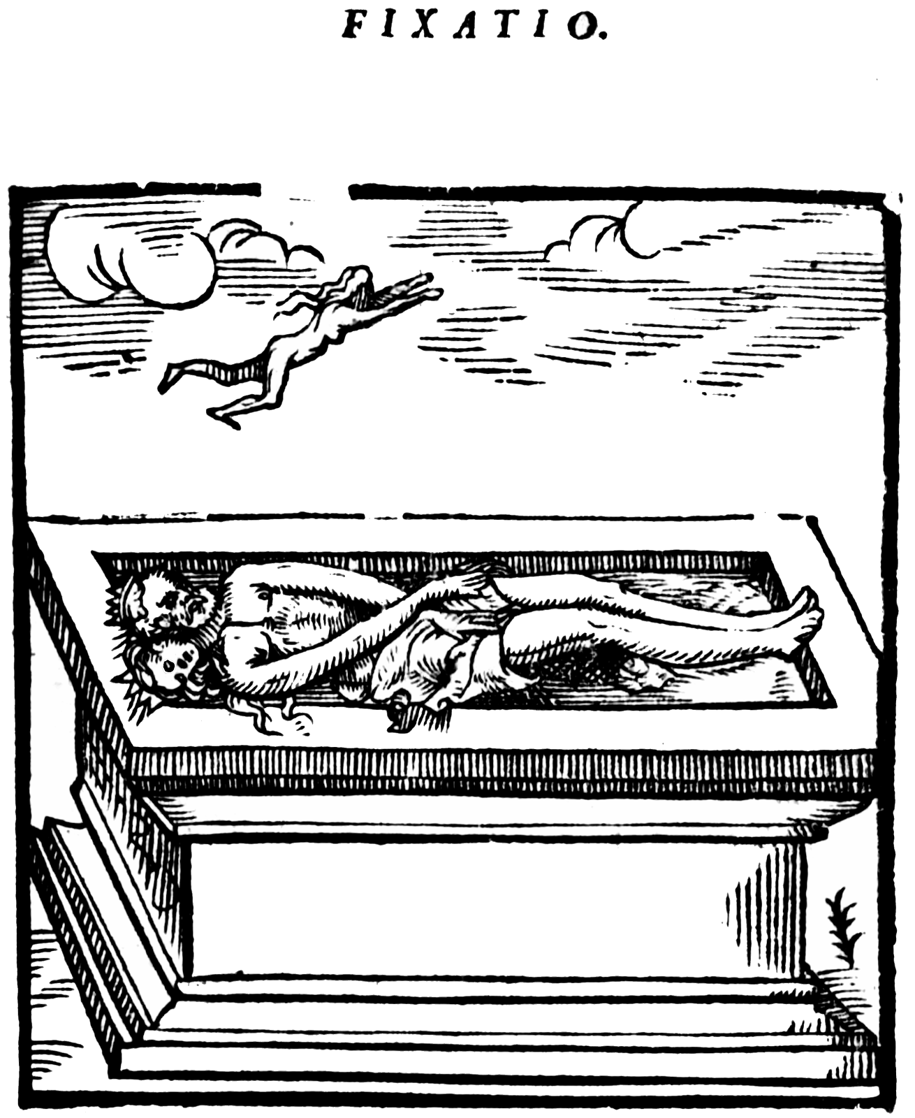 Figura 14 del Rosarium Philosophorum